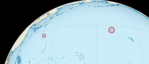 Występowanie gatunku Puffinus bryani na podstawie File:Midway Atoll on the globe (small islands magnified) (Polynesia centered).svg